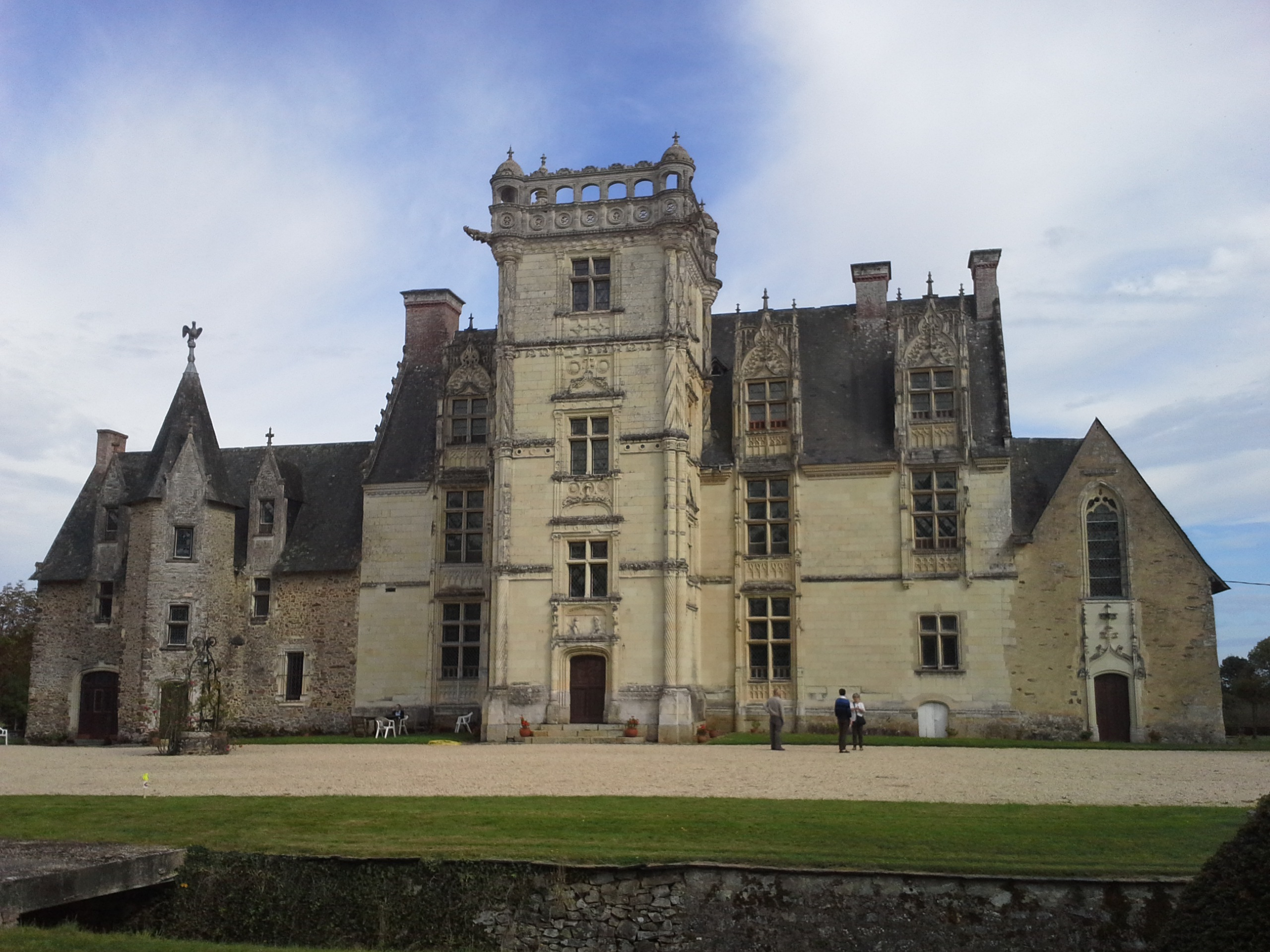 façade du château de Saint-Ouen